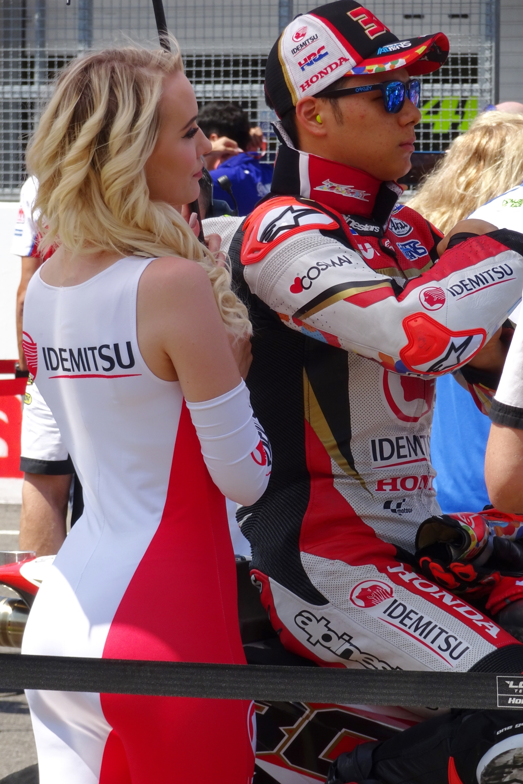 Le pilote MotoGP Takaaki Nakagami sur la grille départ du GP d'Allemagne 2018, sur LCR Honda